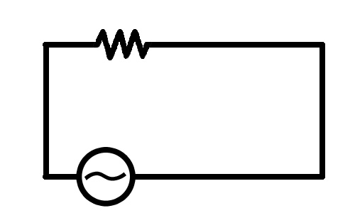 교류회로도